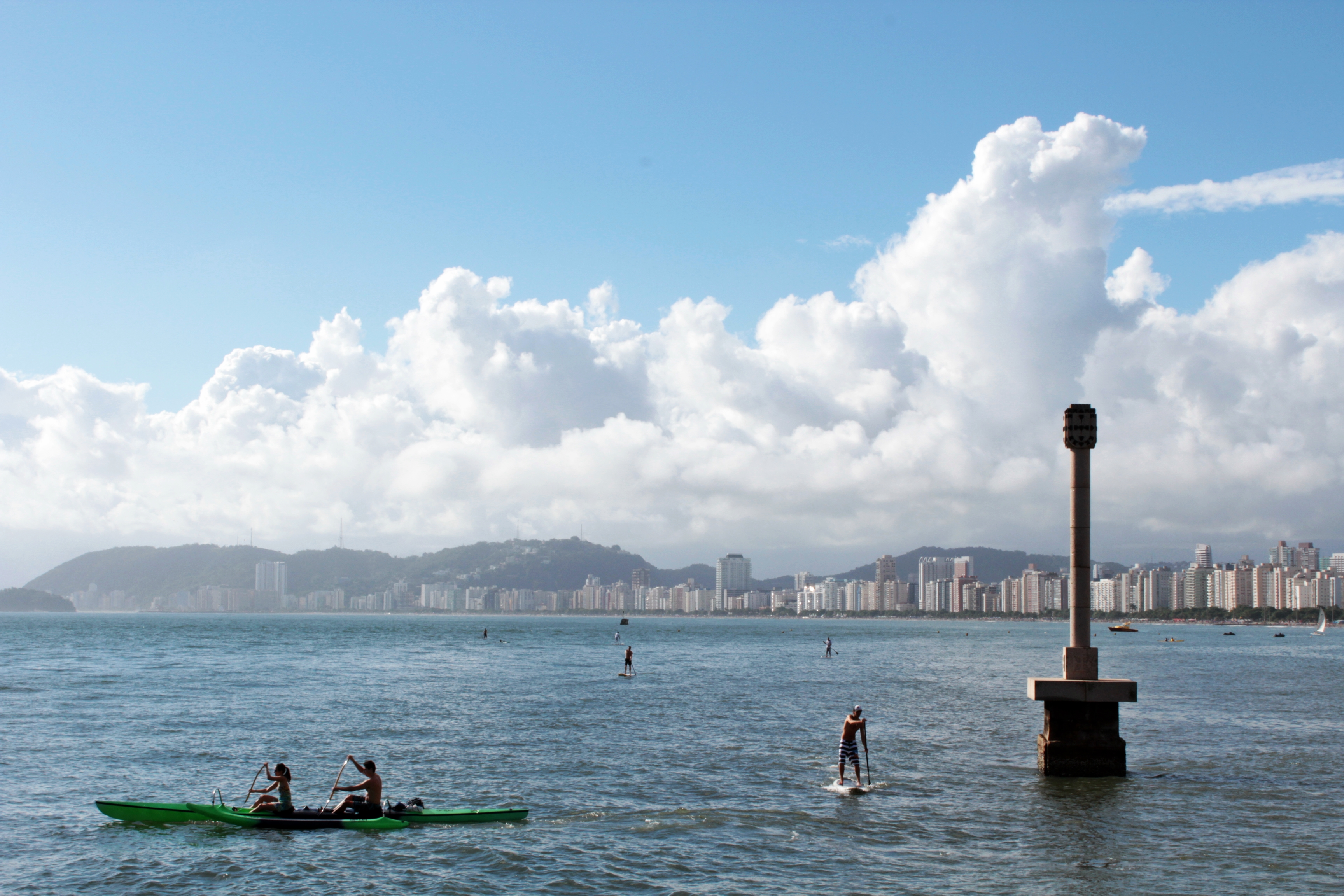 Vista da Baía de Santos.